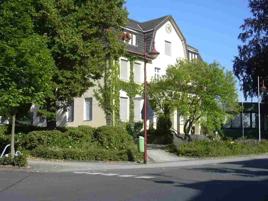 Merzenich, Rathaus Own Work papa1234 2006-07-14